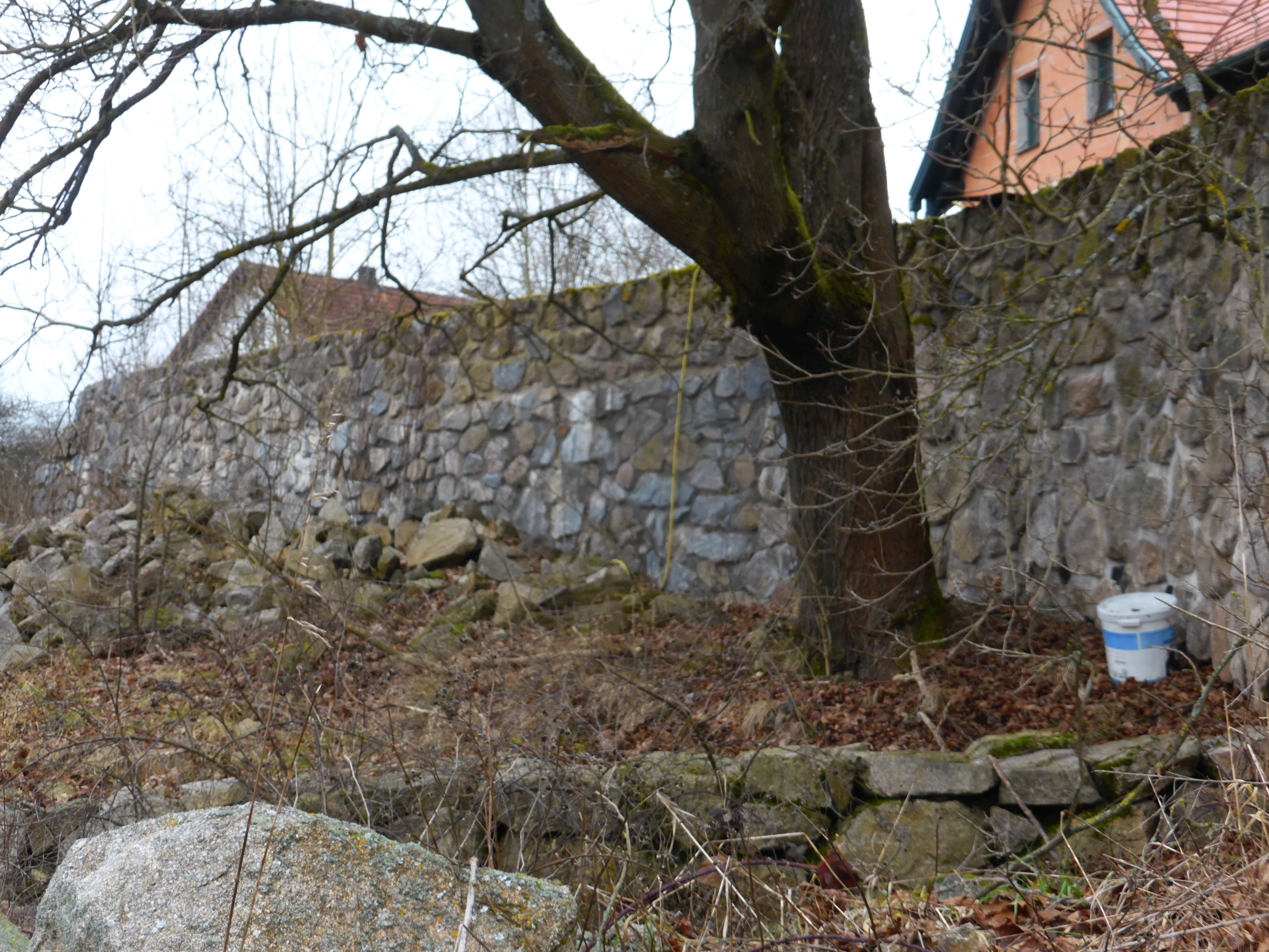 Angebliche Reste der Burg Drackenstein